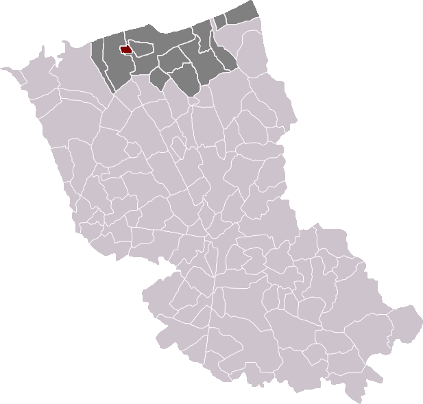 Locatie gemeente Fort-Mardijk in arrondissement Duinkerke. Zelfgemaakt. Location of Fort-Mardyck municipality in the arrondissement of Dunkirk. Self made. Localisation de la commune de Fort-Mardyck dans l'arrondissement de Dunkerque. Fait moi-même.